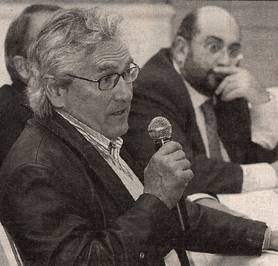 Carlos Zayas, periodista y político español